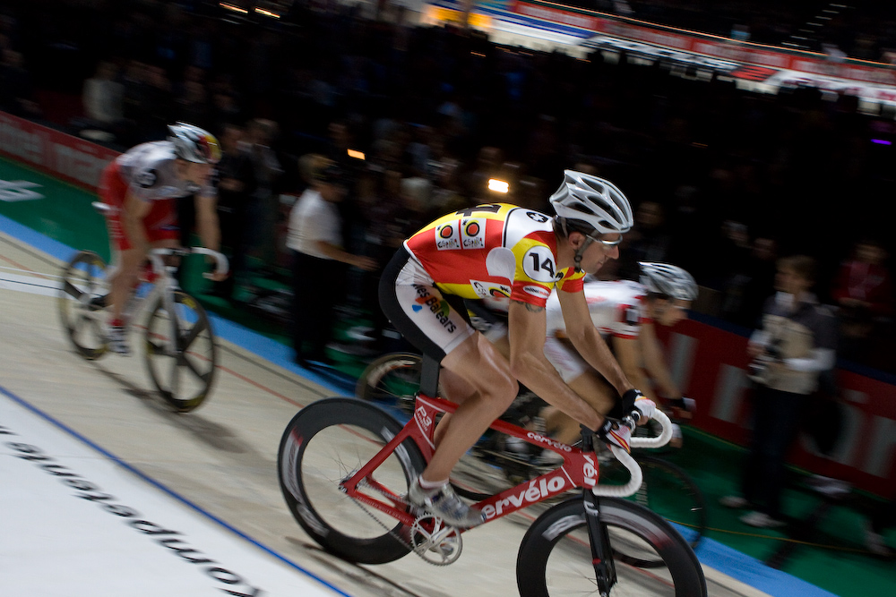 Toni Tauler, Sixdays Zürich 2007-2008